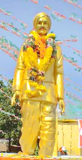 గుంటూరు జిల్లాలోని కన్నెగంటి హనుమంతు విగ్రహం